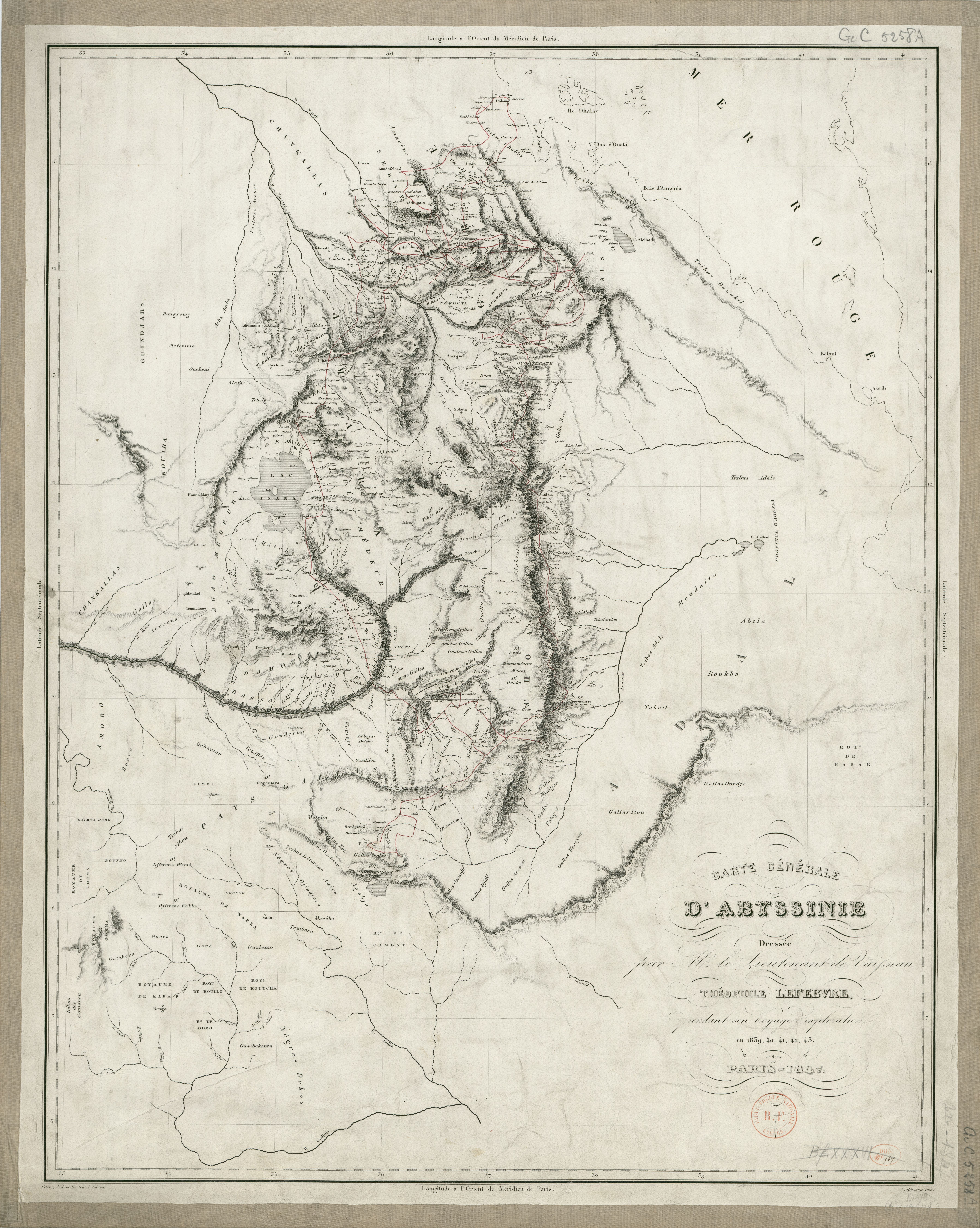 Carte générale d'Abyssinie / dressée par M. le Lieutenant de Vaisseau Théophile Lefebvre pendant son voyage d'exploration en 1839, 40, 41, 42, 43. Bibliothèque nationale de France, département Cartes et plans, GE C-5258 (A)